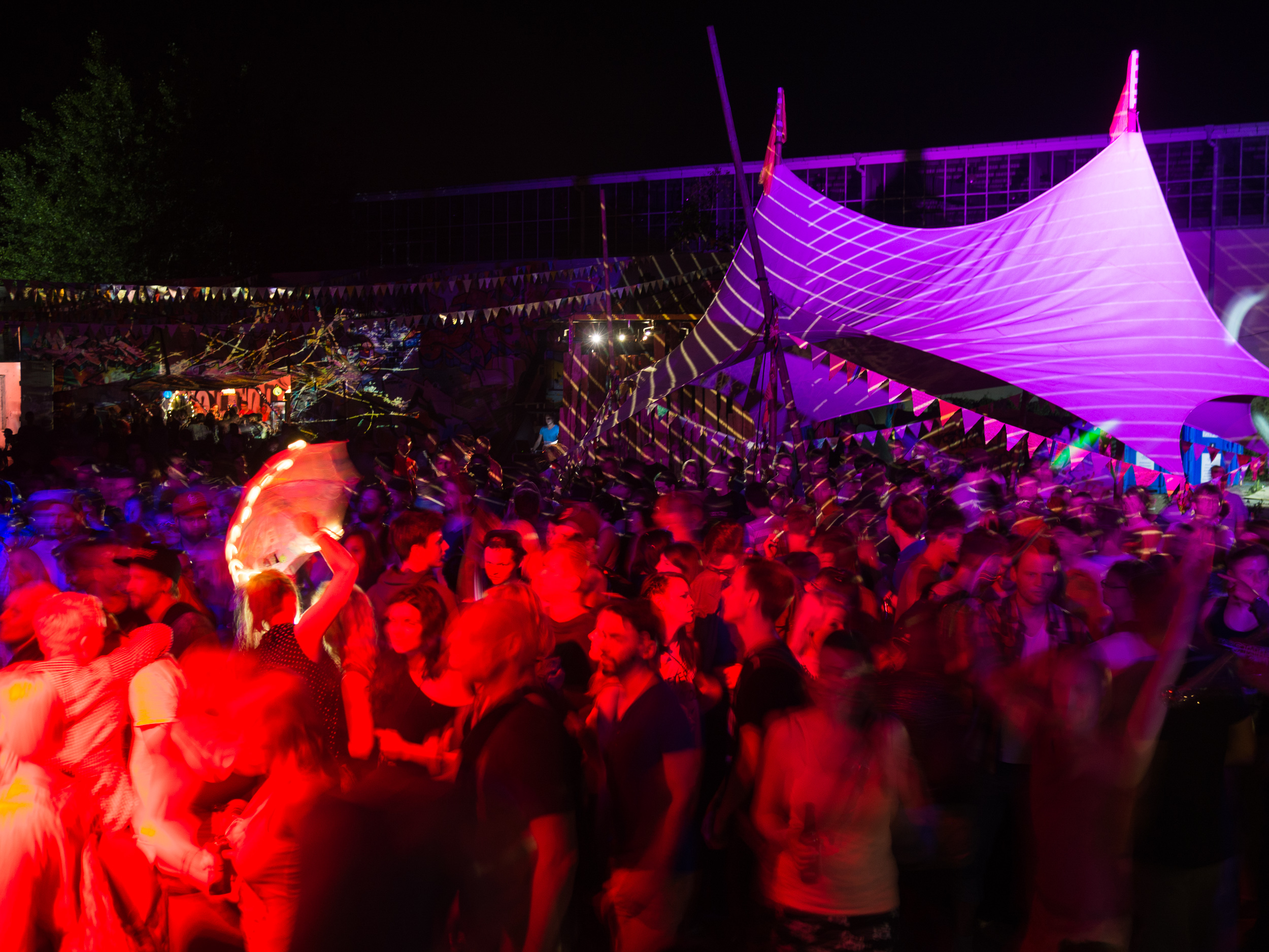 Veranstaltung "Tanzbetrieb im Randgebiet" in der Aerosol-Arena Magdeburg